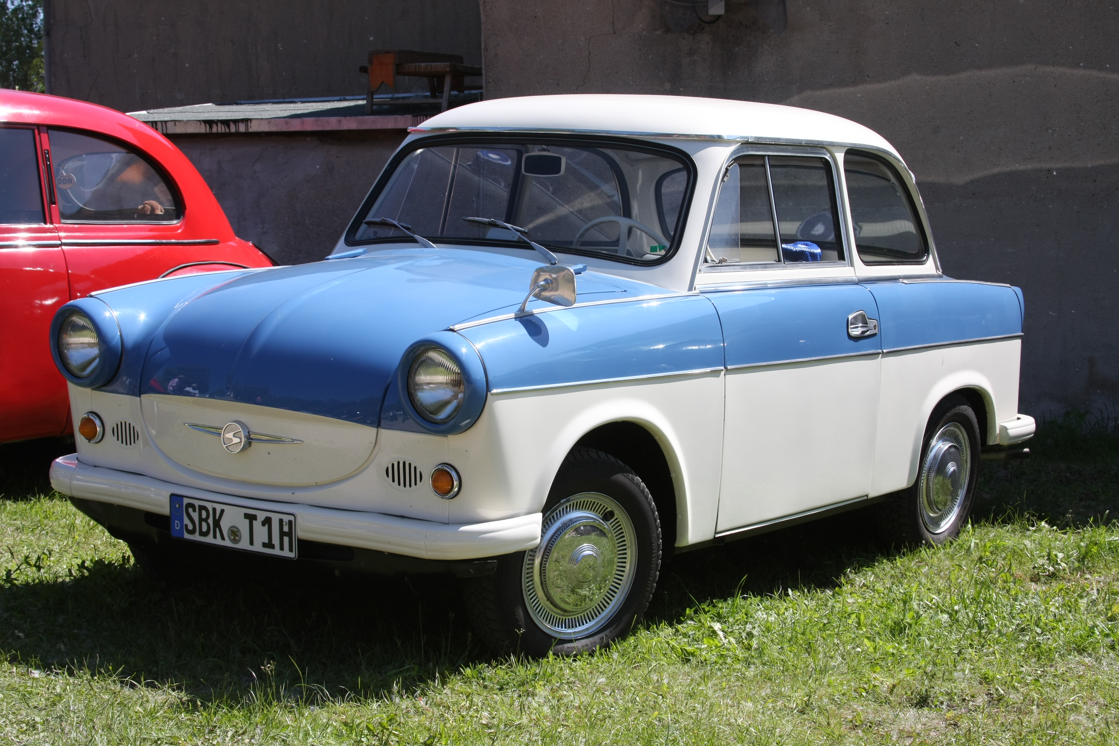 34. DKW-Treffen in Garitz 2010